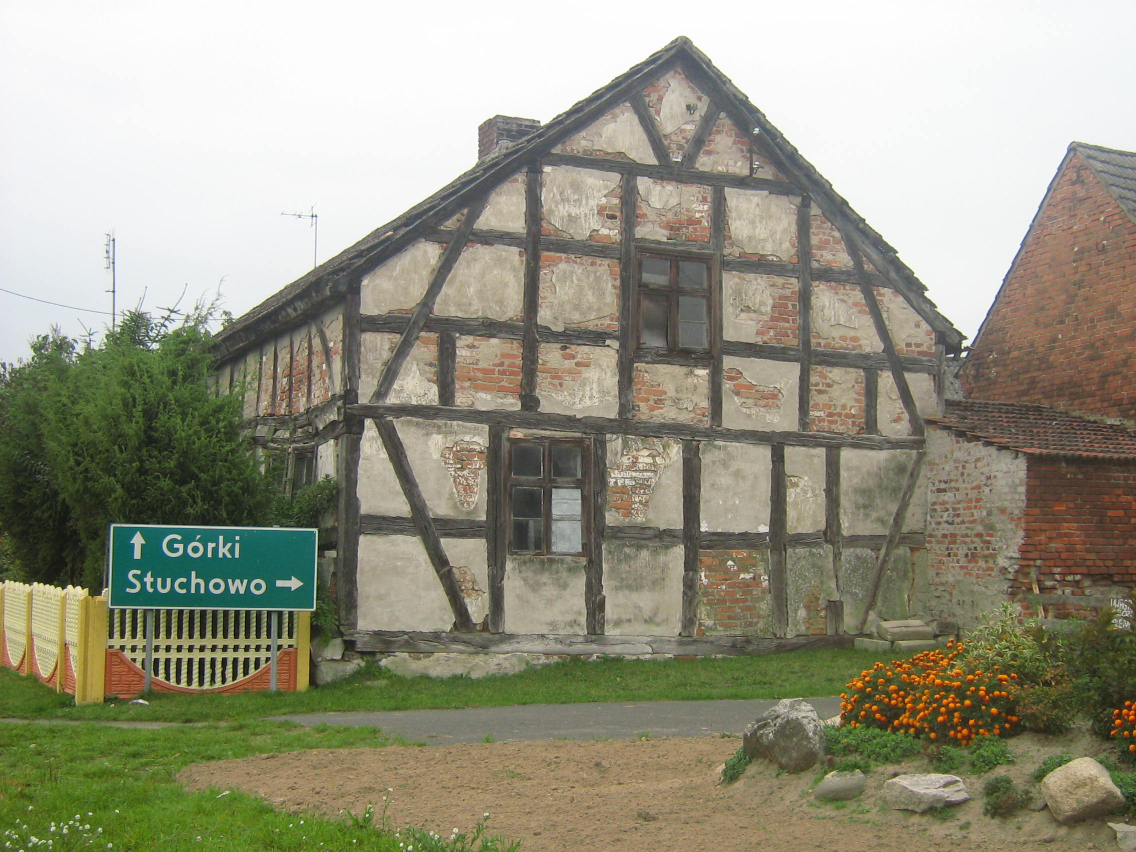 Przedwojenny dom w Mechowie